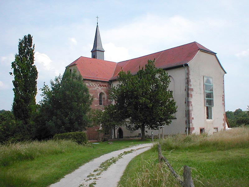 Klosterkirche Lobbach-Lobenfeld